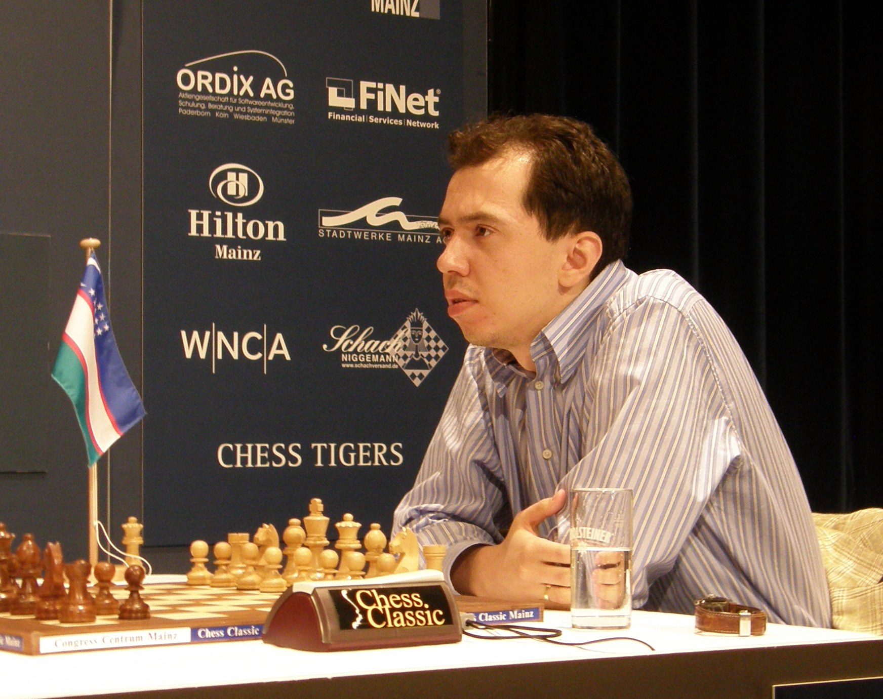 Гроссмейстер Рустам Касымджанов